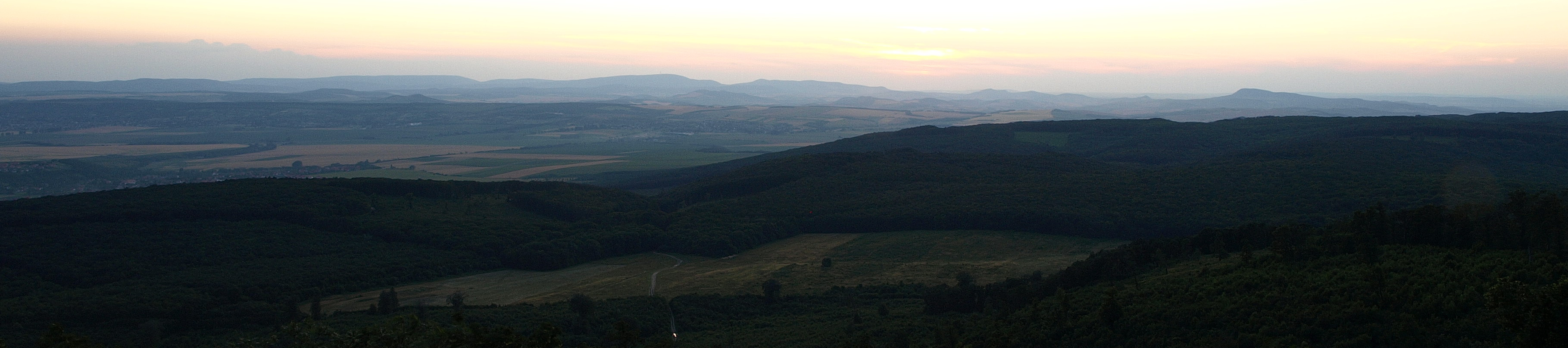 Budai-hegység, Magyarország